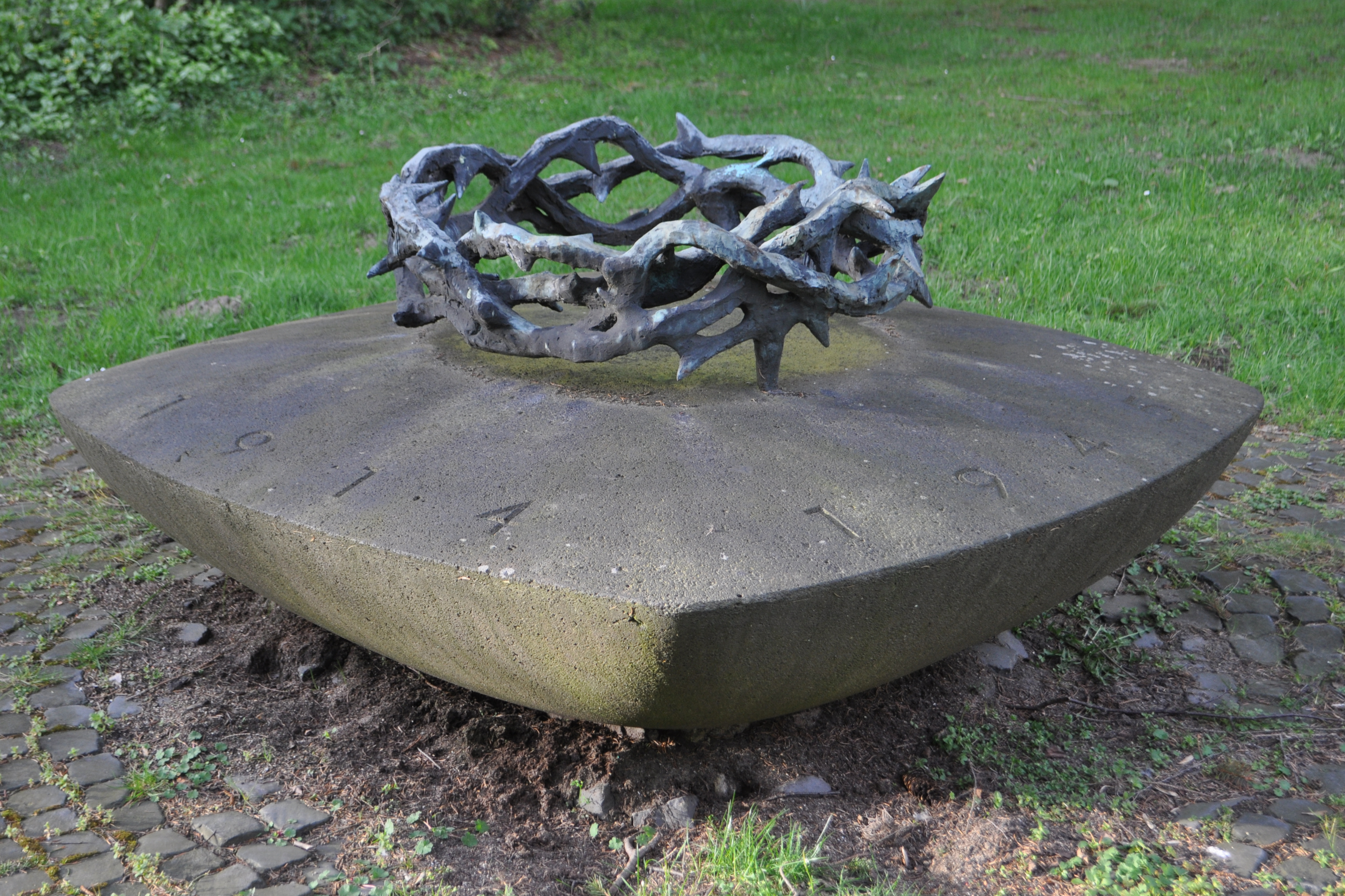 Kriegerdenkmal für die Gefallenen des Ersten und Zweiten Weltkriegs auf dem Waldfriedhof in Hamburg-Volksdorf. This is a photograph of an architectural monument.